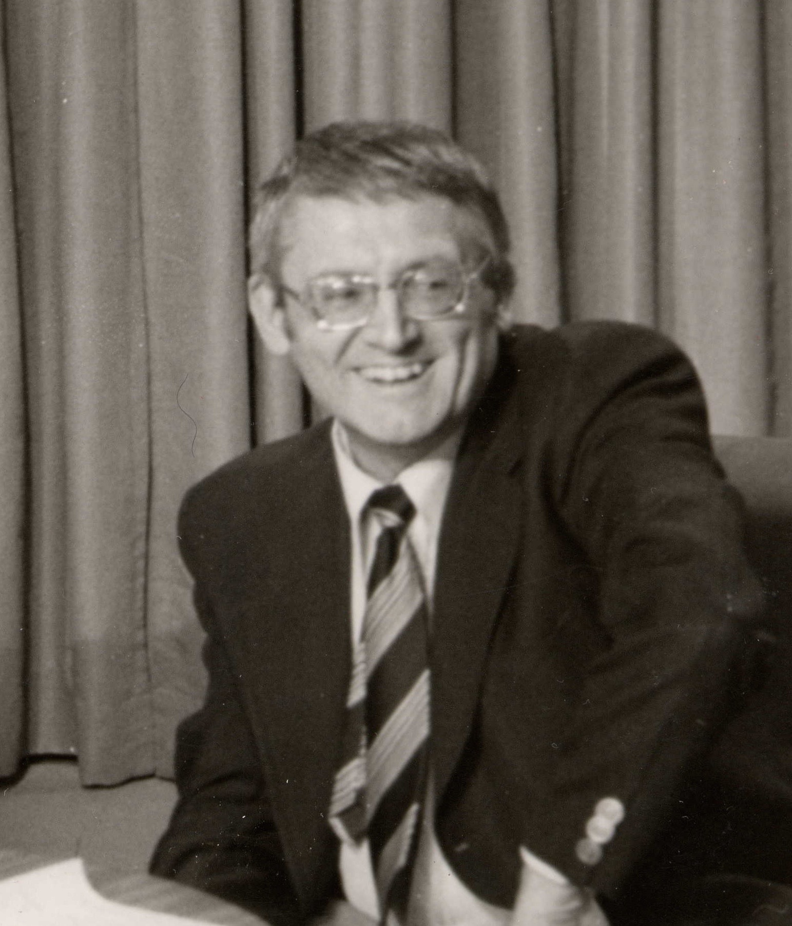 Pierre Fritsch lors d'une émission sur RTL TV avec Jacques Navidic